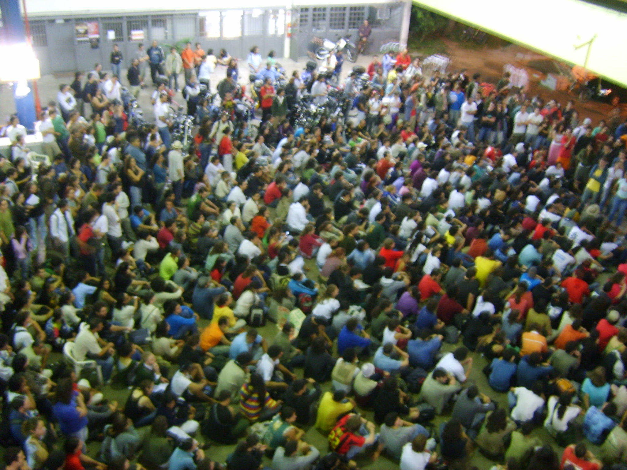 Assembléia estudantil da USP